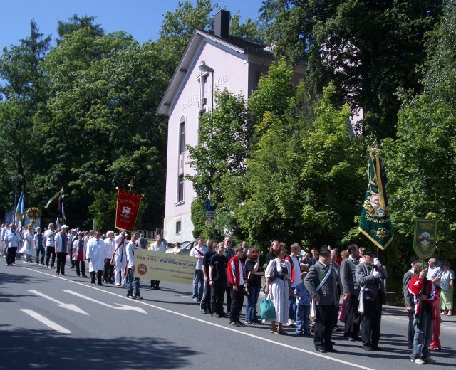 Umzug zum 574. Hofer Schlappentag, kurz für dem Schießhäuschen in der Lessingstraße selbst aufgenommen am 12.Juni 2006